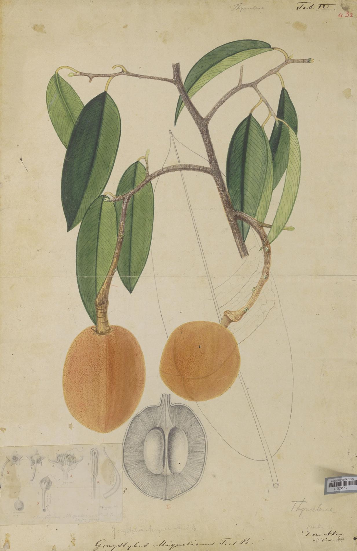 Gonystylus miquelianus